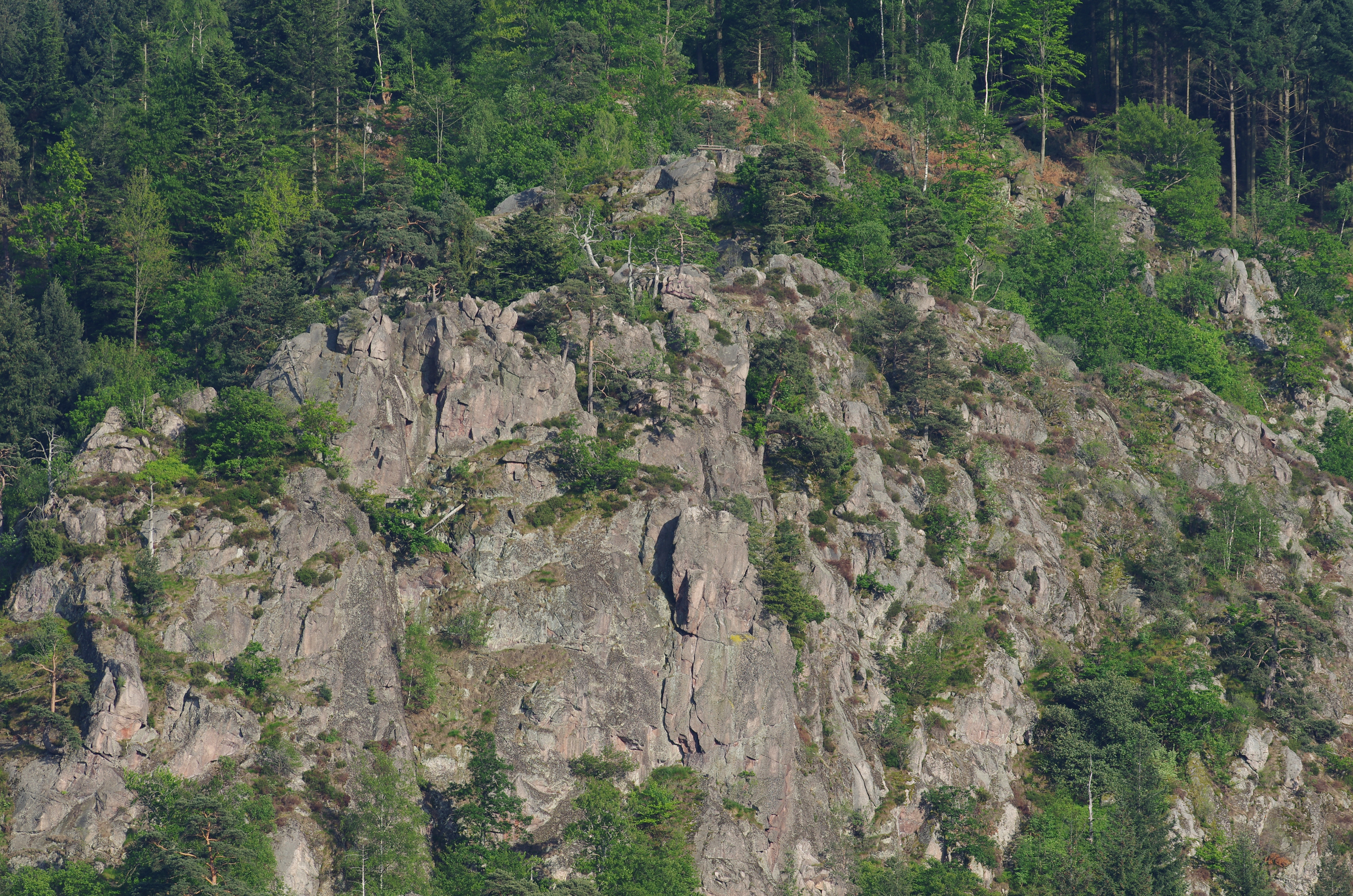 Lautenfelsen, Granitfelsen im Naturschutzgebiet Lautenfelsen oberhalb von Gernsbach-Lautenbach. Teleaufnahme aus ca. 1,2 km Entfernung vom Hartberg. Eine soeben erkennbare Sitzbank auf den Felsen in der oberen Bildmitte macht den Maßstab deutlich, siehe Notiz im Bild.